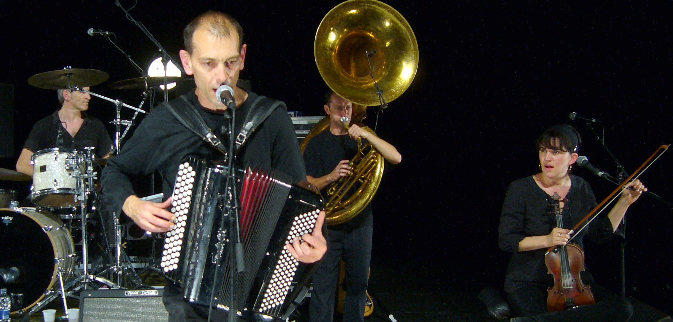 Vue prise par Hervé Suaudeau (Utilisateur:Suaudeau) lors du concert des Têtes Raides à Villeparisis le 7 octobre 2006.